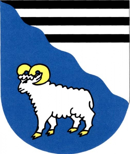 znak, Řečice, okres Žďár nad Sázavou